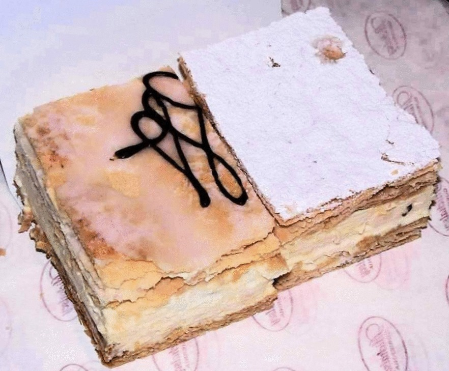 Photo by Piotrus. Kremówki.